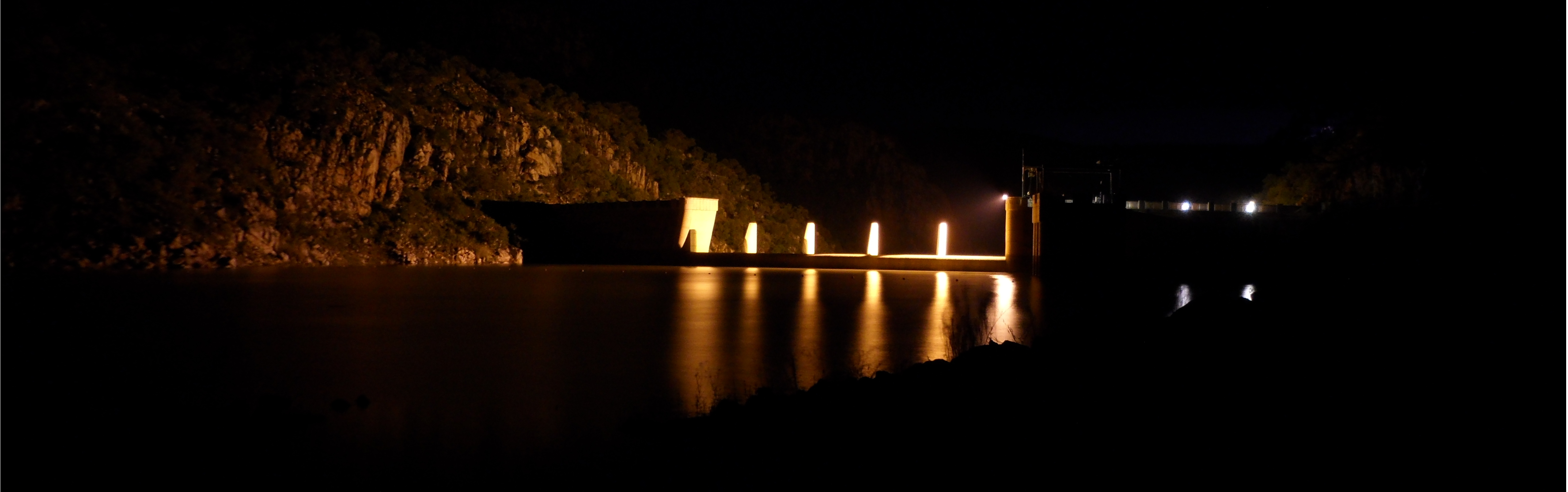 Bivane dam wall at night